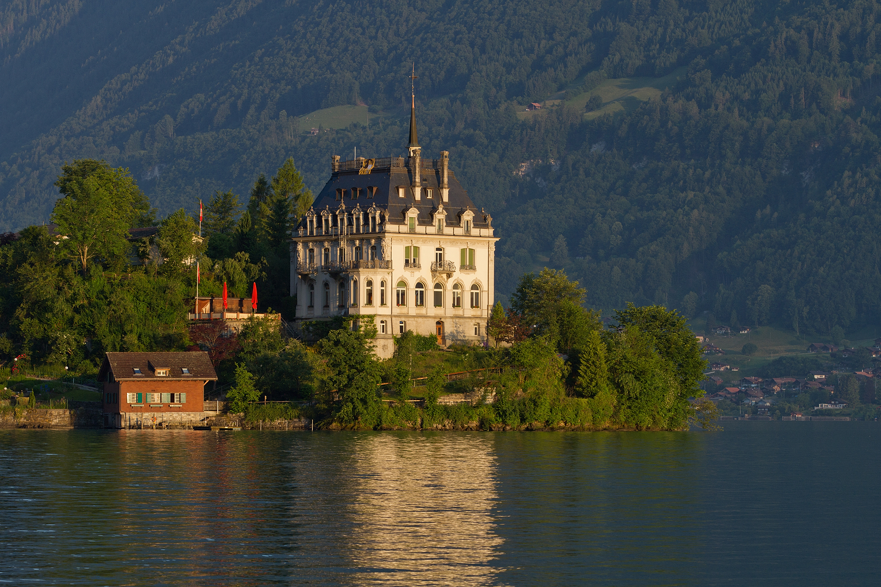 Seeburg in Iseltwald am Brienzersee (BE)